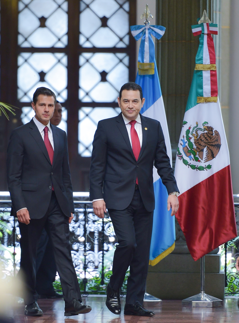 Visita de Estado a Guatemala (día 2) (7)